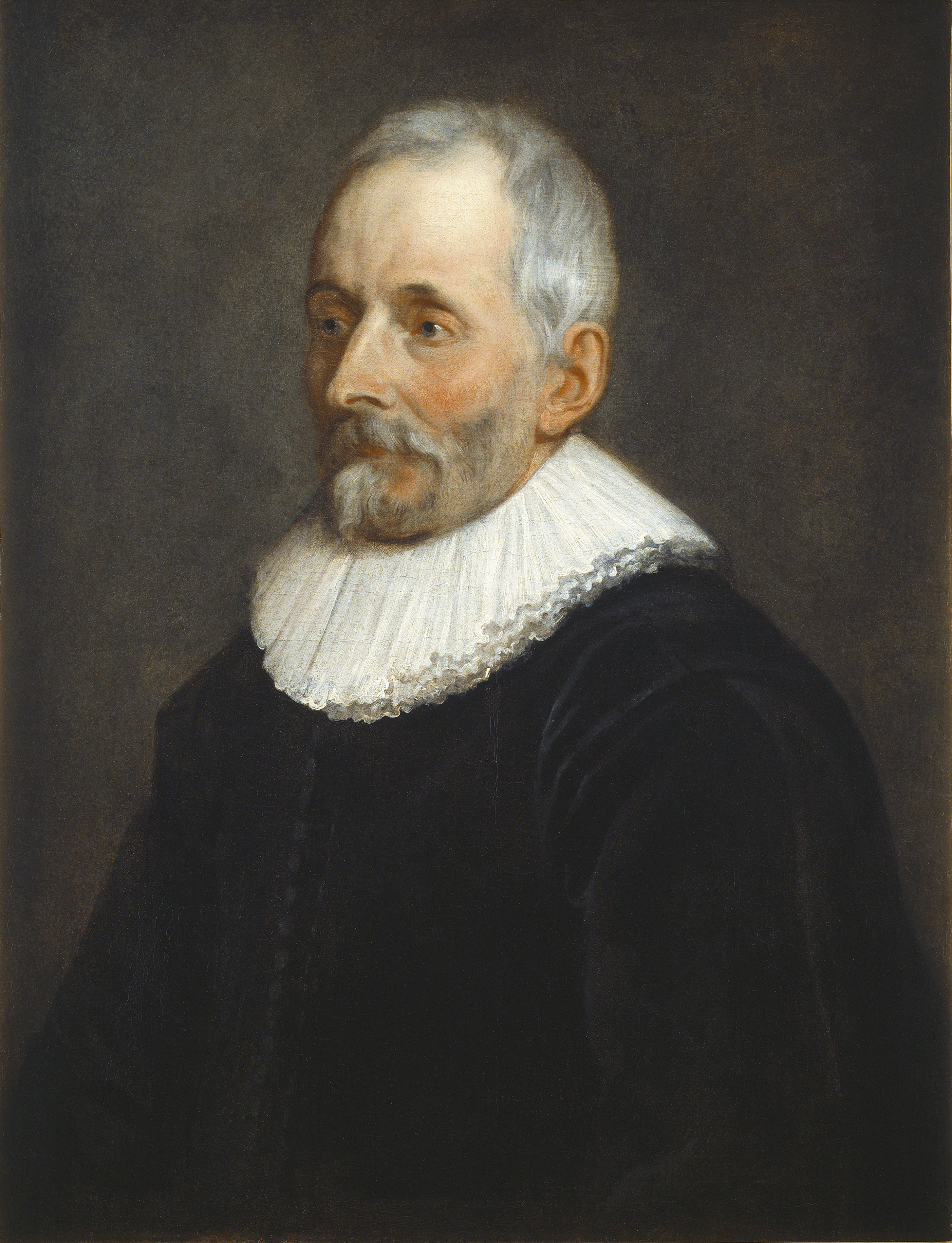 schilderij ( Thomas Willeboirts Bosschaert ( Museum Plantin-Moretus